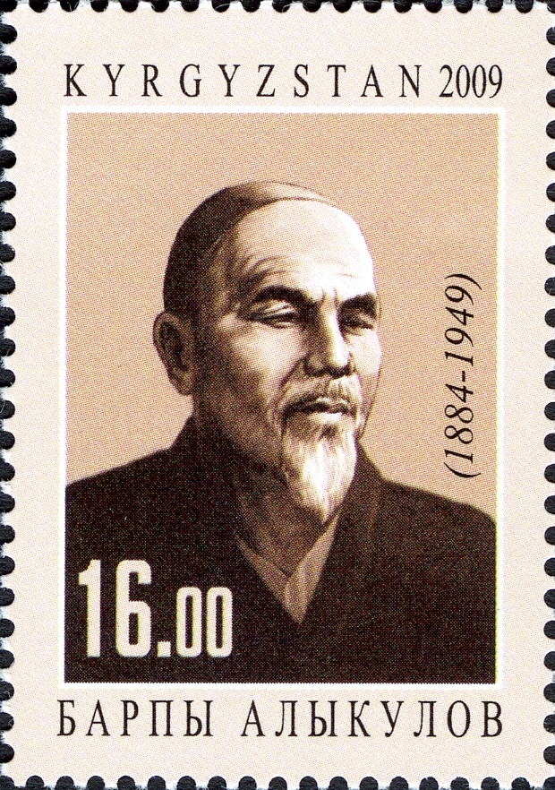 125th years Barpy Alykulov 585, number by Kyrgyz catalogue